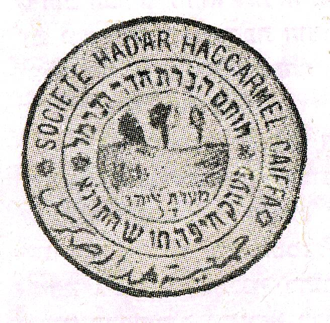 חותמת "חברת הדר הכרמל" שהקימה את שכונת ארד אל-יהוד בחיפה. החותמת משנת 1891